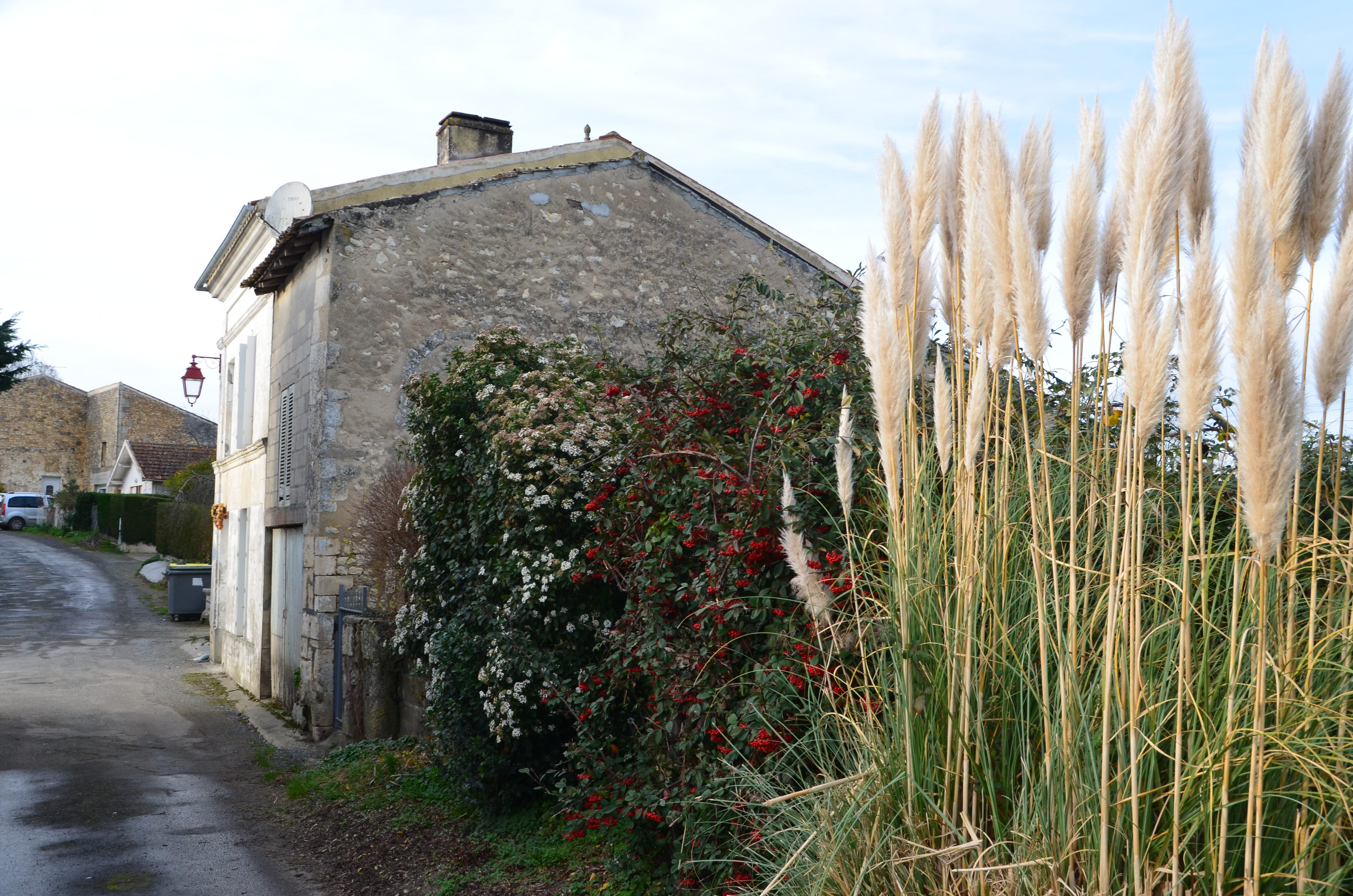 rue de la République